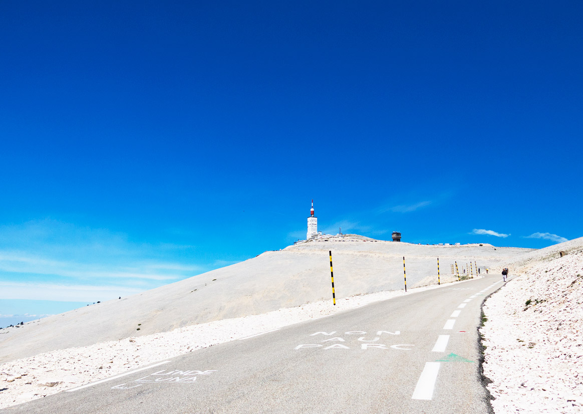 Ventoux Flamme Rouge